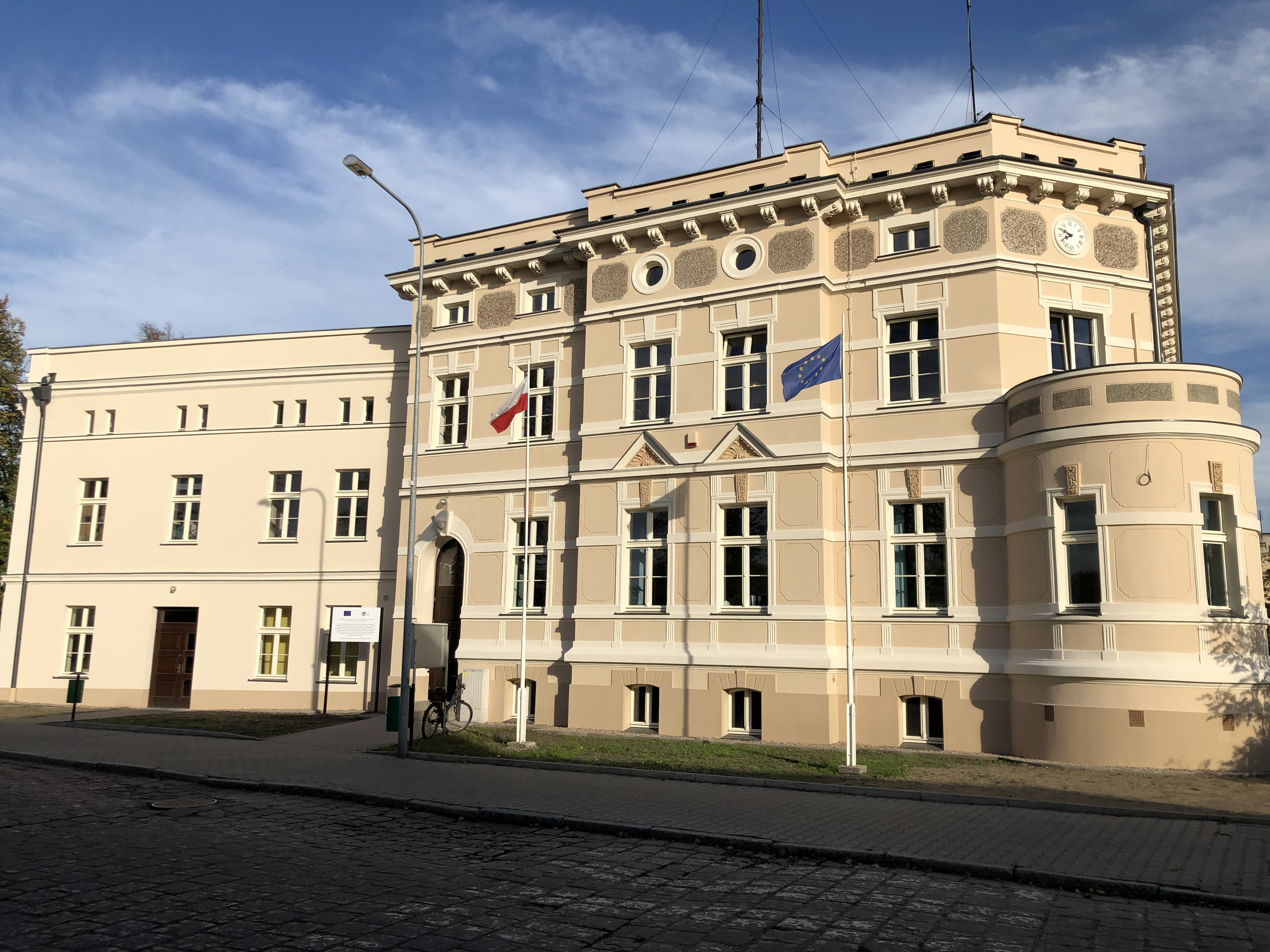 Urząd Miejski w Bierutowie